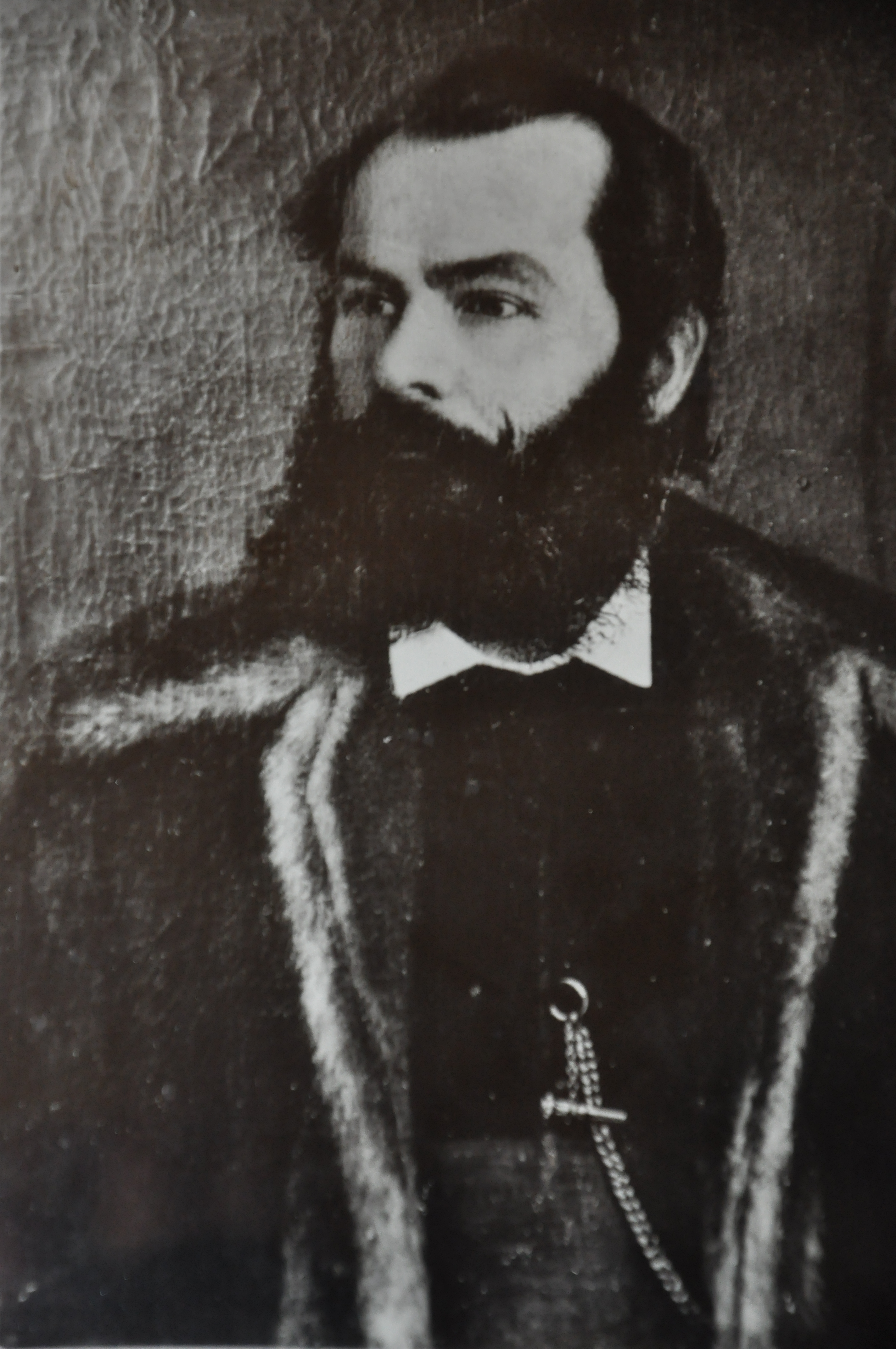 Prota Mlioš Joksić